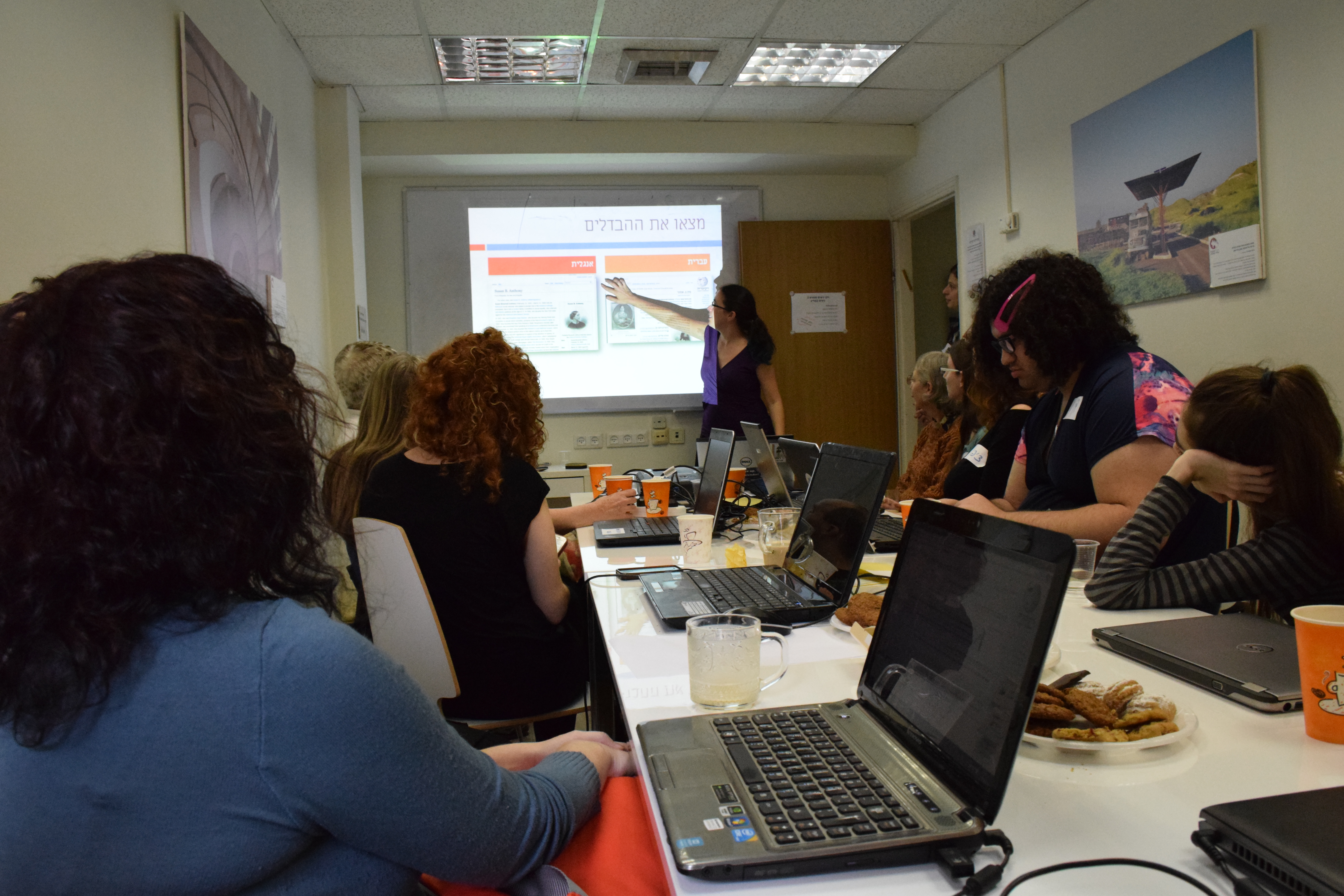 ויקי נשים מפגש 2: נשים במדע